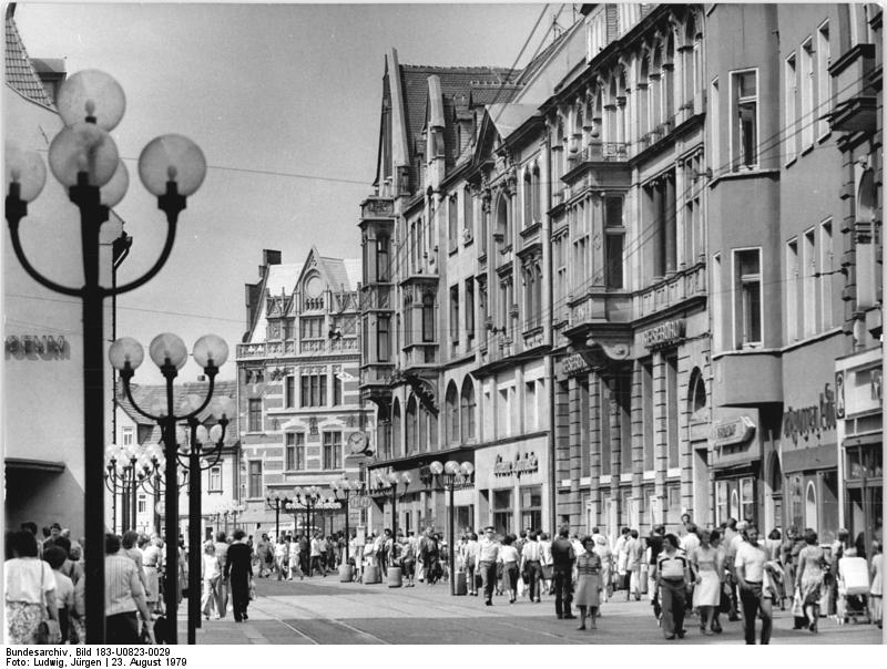 Erfurt, Bahnhofsstraße ADN-ZB Ludwig-23.8.79 Erfurt: Gartenbauausstellung- für die Besucher der Gartenbauausstellung (iga) ist auch die Erfurter Innenstadt sehenswert. Ein Blick in die neu gestaltete Bahnhofstraße, eine Hauptgeschäftsstraße der Bezirksstadt.